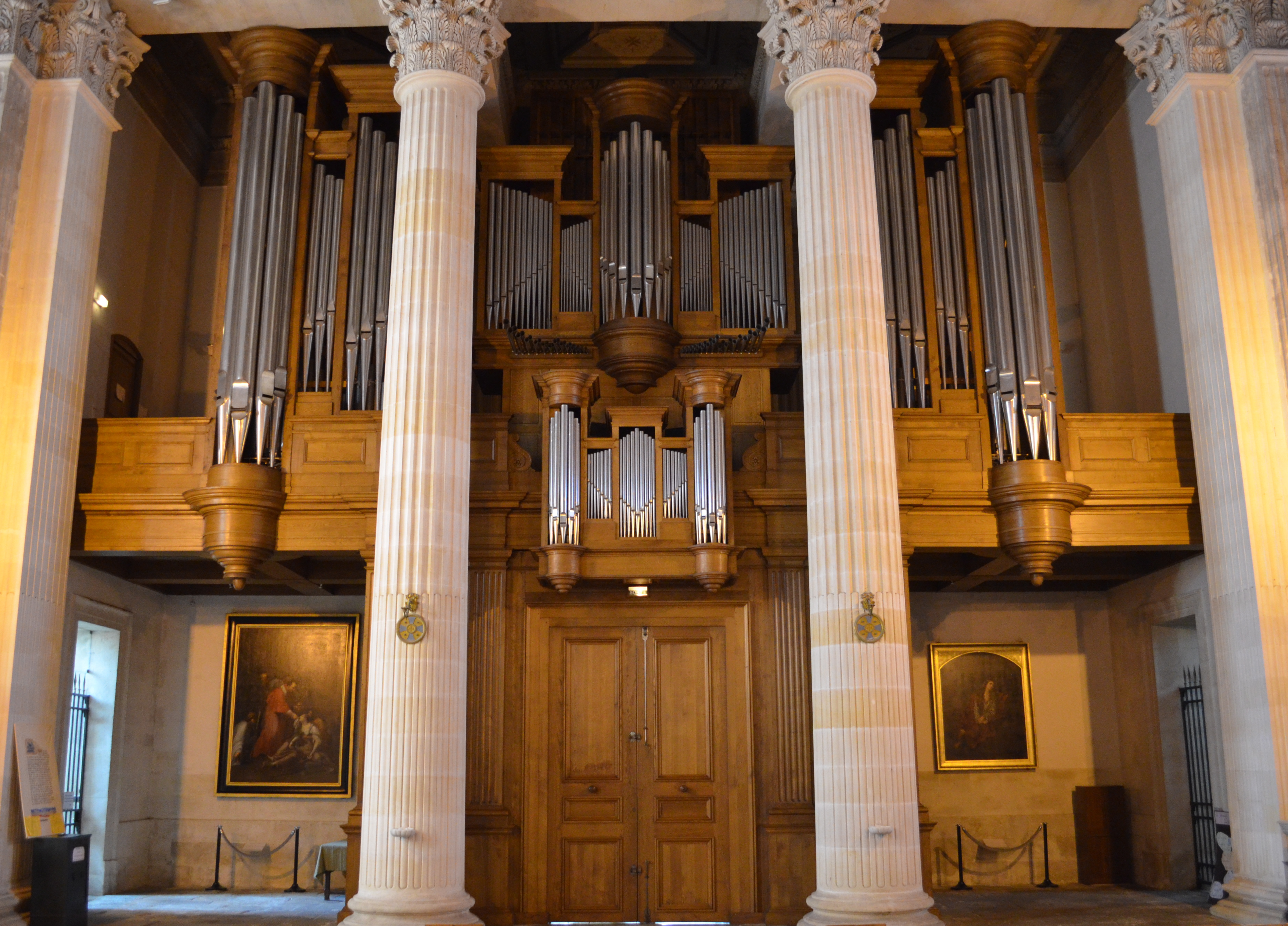 Église Saint-Louis, construite entre 1813 et 1830 - La Roche-sur-Yon .